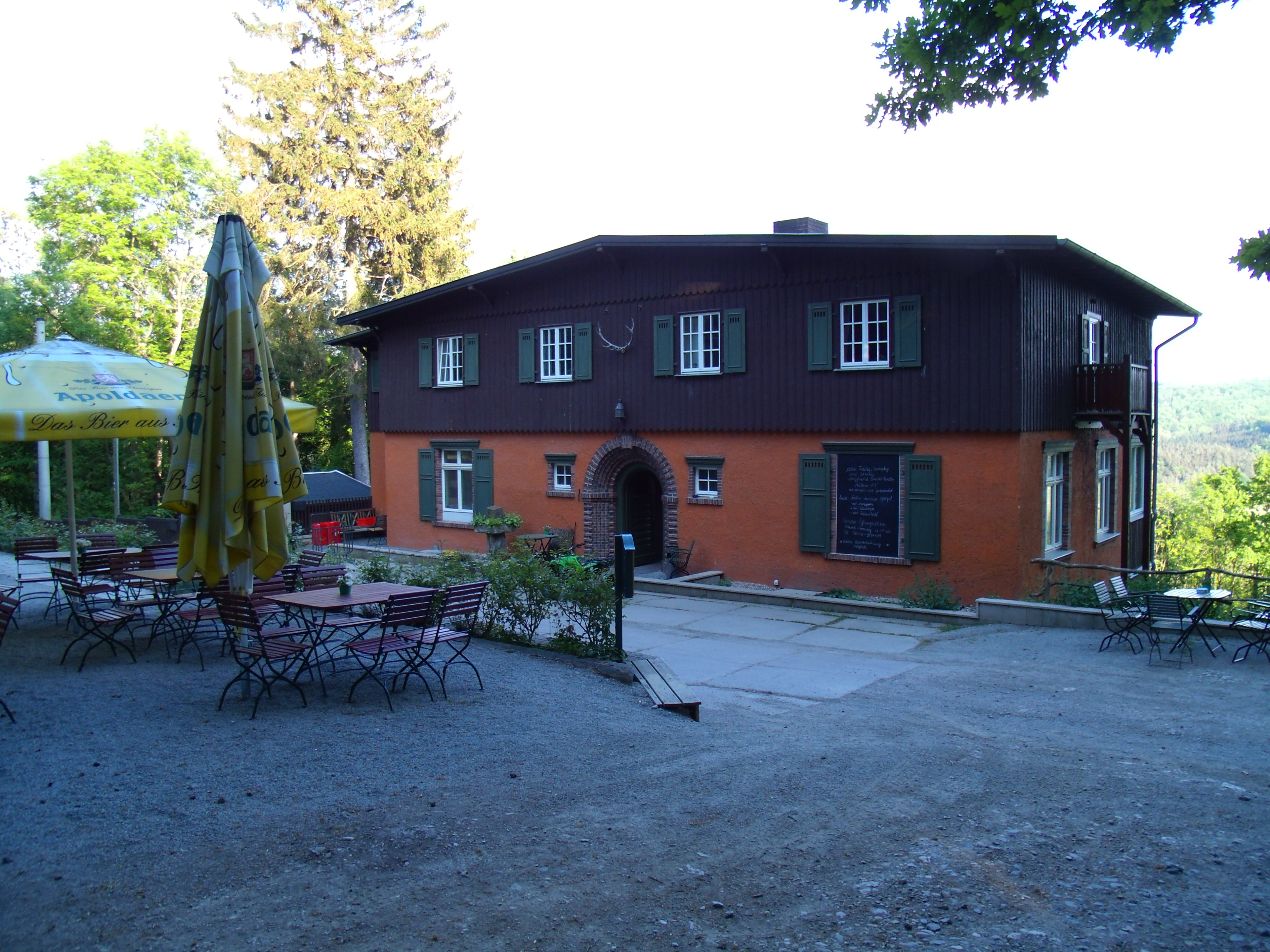 Das Waldgasthaus Balsamine, Am Schloßberg 50 in 99438 Buchfart bei Weimar/ Thüringen.